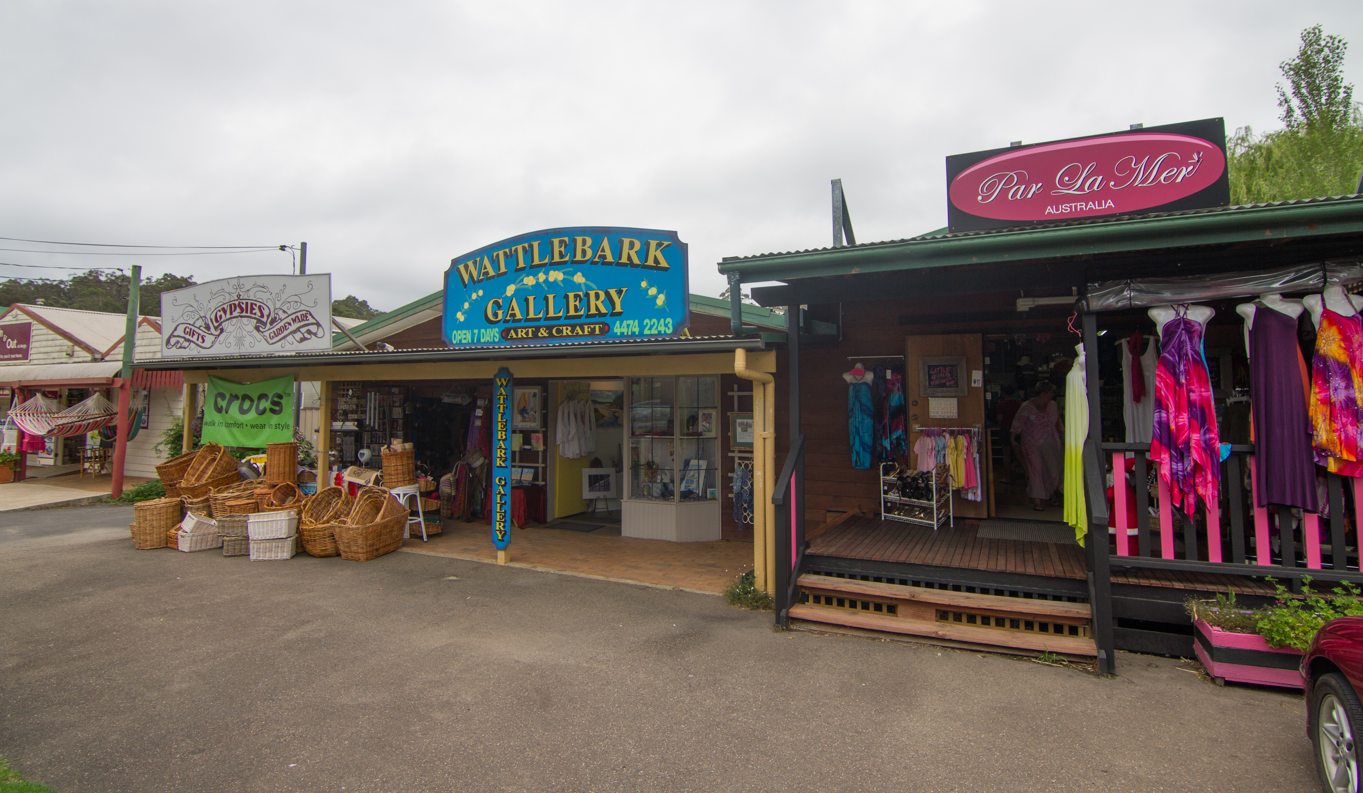 Mogo NSW 2536, Australia